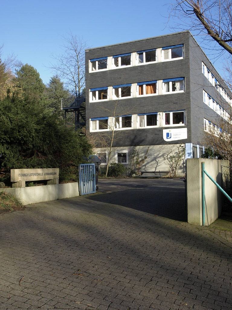 Evangelistenschule Johanneum in Wuppertal Melanchthonstraße 36, Quartier Sedansberg